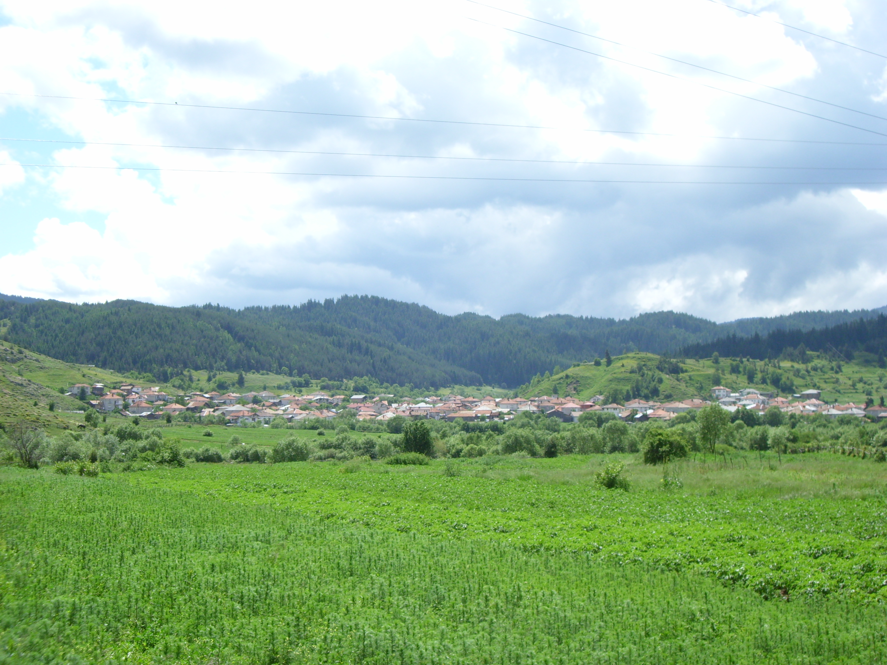 Село Барутин, Горната махала